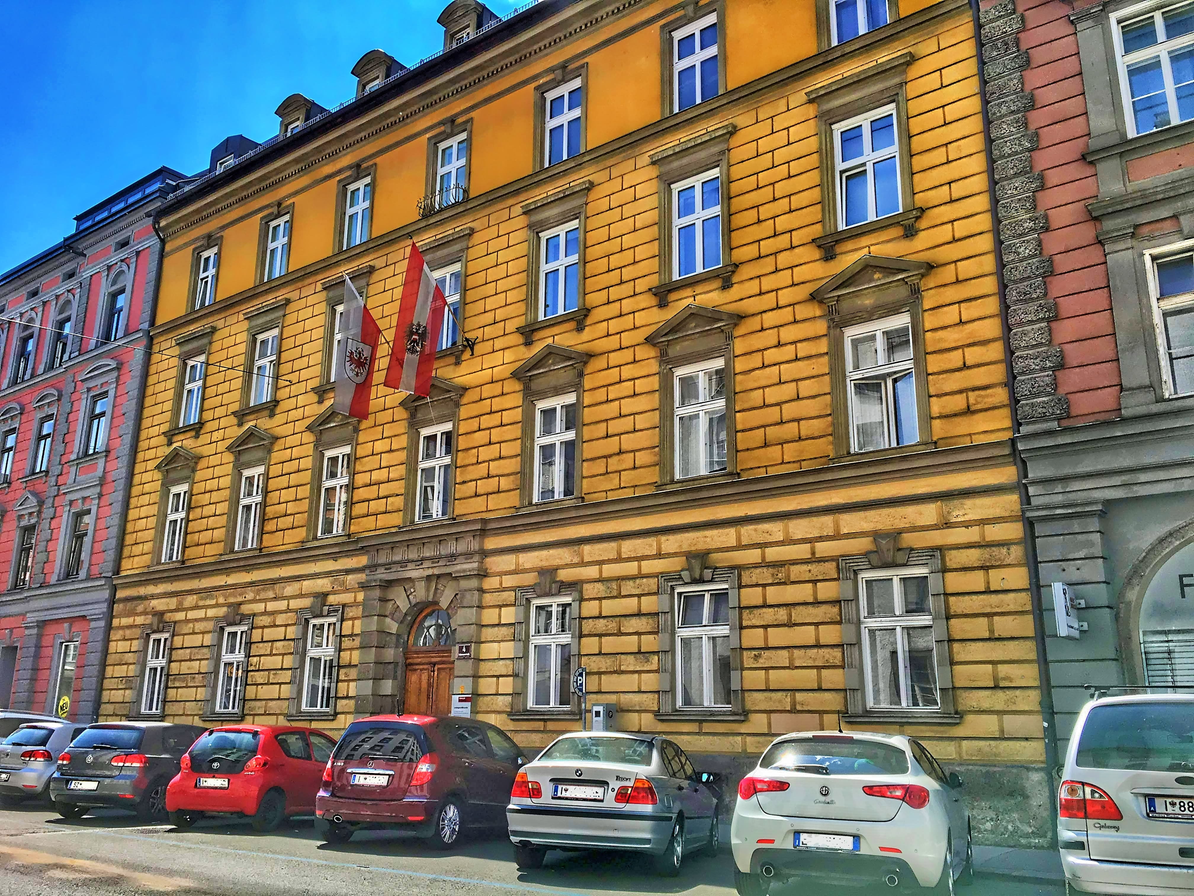 Das Haus der Tiroler Volkspartei befindet sich in der Fallmayerstraße 4. Das Gebäude befindet sich im Eigentum der politischen Partei. 2006 zog die Partei von der Maria-Theresien-Straße in dieses historische Haus um. Zuvor residierte die Tiroler Volkspartei am Südtiroler Platz, direkt gegenüber dem Innsbrucker Hauptbahnhof. Im Haus der Tiroler Volkspartei ist die Landesgeschäftsstelle, die Bezirksgeschäftsstellen von Innsbruck Stadt und Innsbruck Land sowie die Junge Volkspartei Tirol untergebracht.